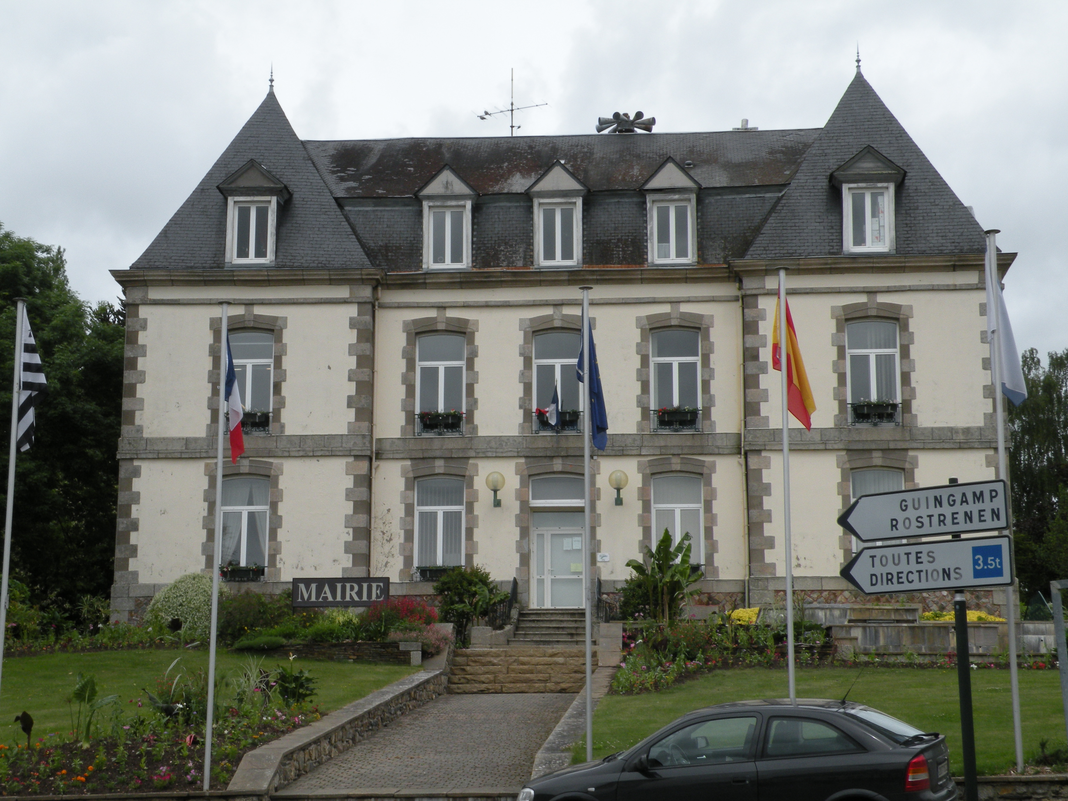 Mairie de Mûr-de-Bretagne.